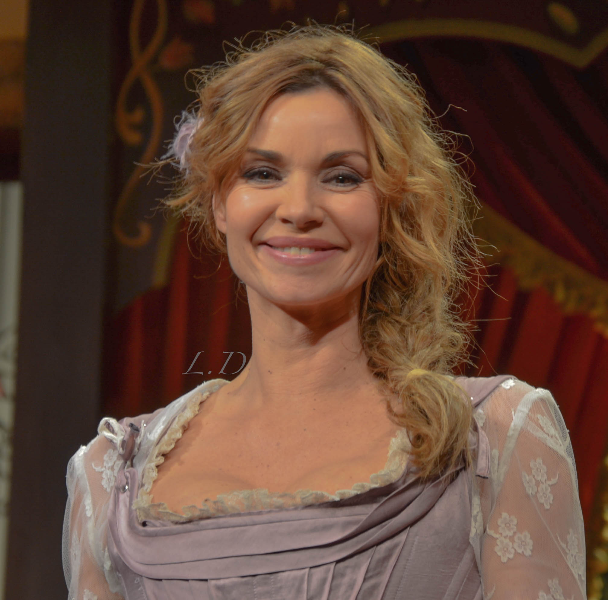 Ingrid Chauvin au Théâtre de la Michodière à Paris le 24 janvier 2015